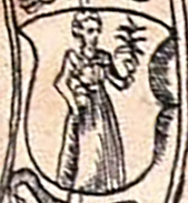 Герб Новогрудского воеводства из польского издания Статута Великого княжества Литовского 1588 года, изданного в 1614 году.